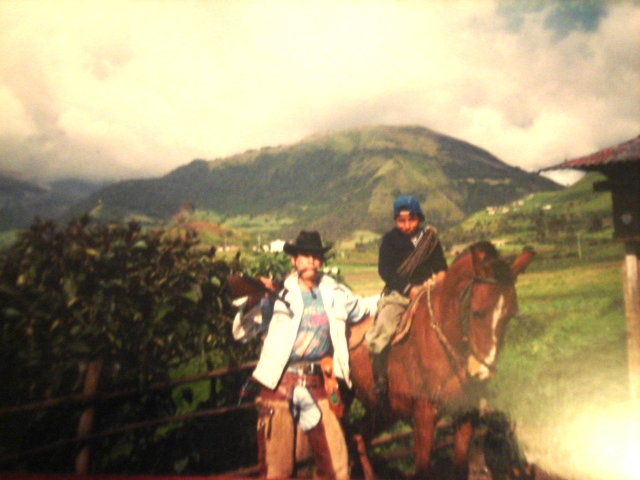 paramo daldal comunidad daldal vestuario daldal tradicion daldal